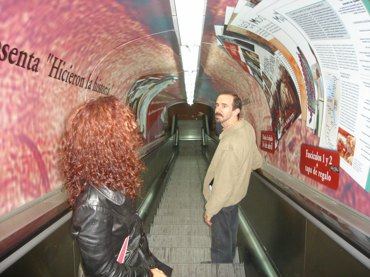 Escalera mecánica de acceso a andenes de la estación Pueyrredón de la línea D de la red de subterráneos porteña.